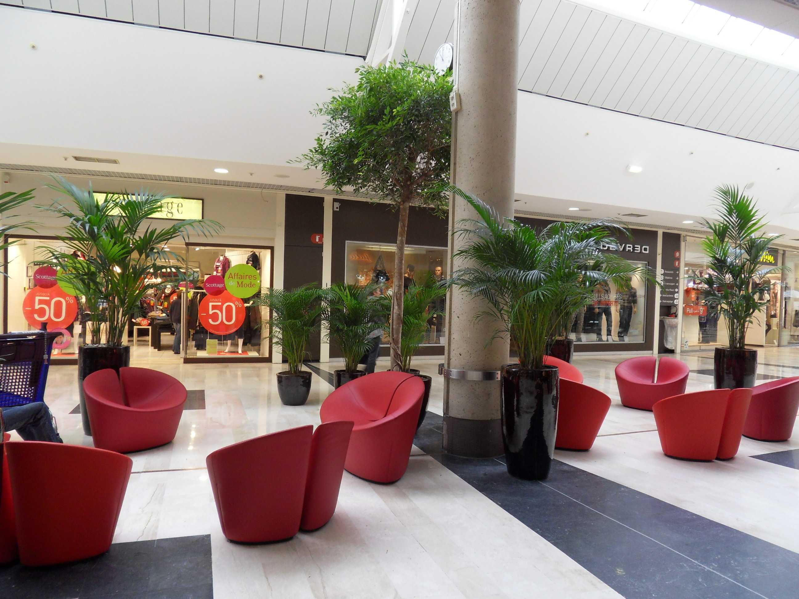 Espace détente dans la galerie du Centre Commercial de Tourville-la-Rivière en Haute Normandie.